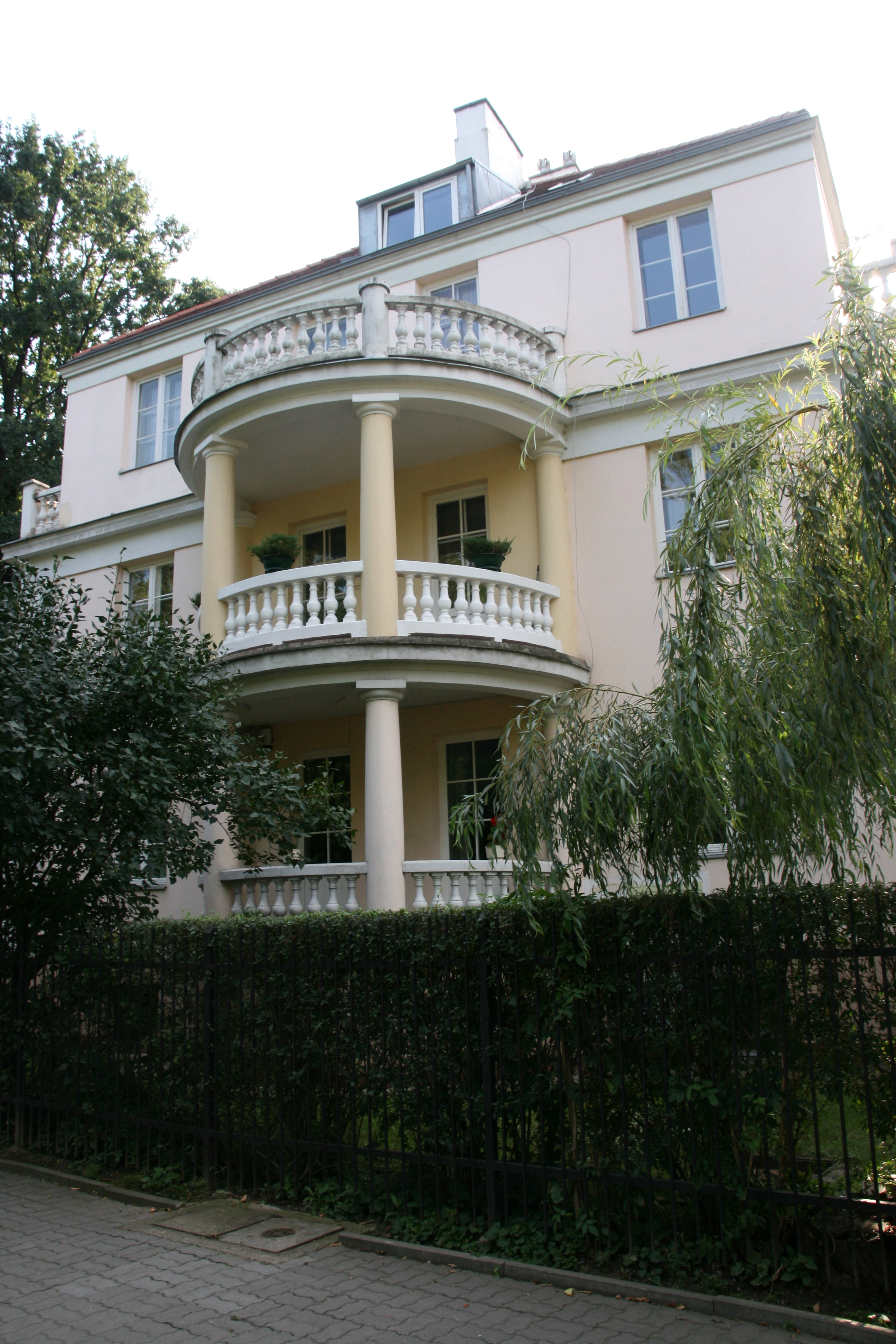 Dom, 1935 r., ul. Saska 101, Warszawa - Saska Kępa, dz. Praga Południe. 05.1989.